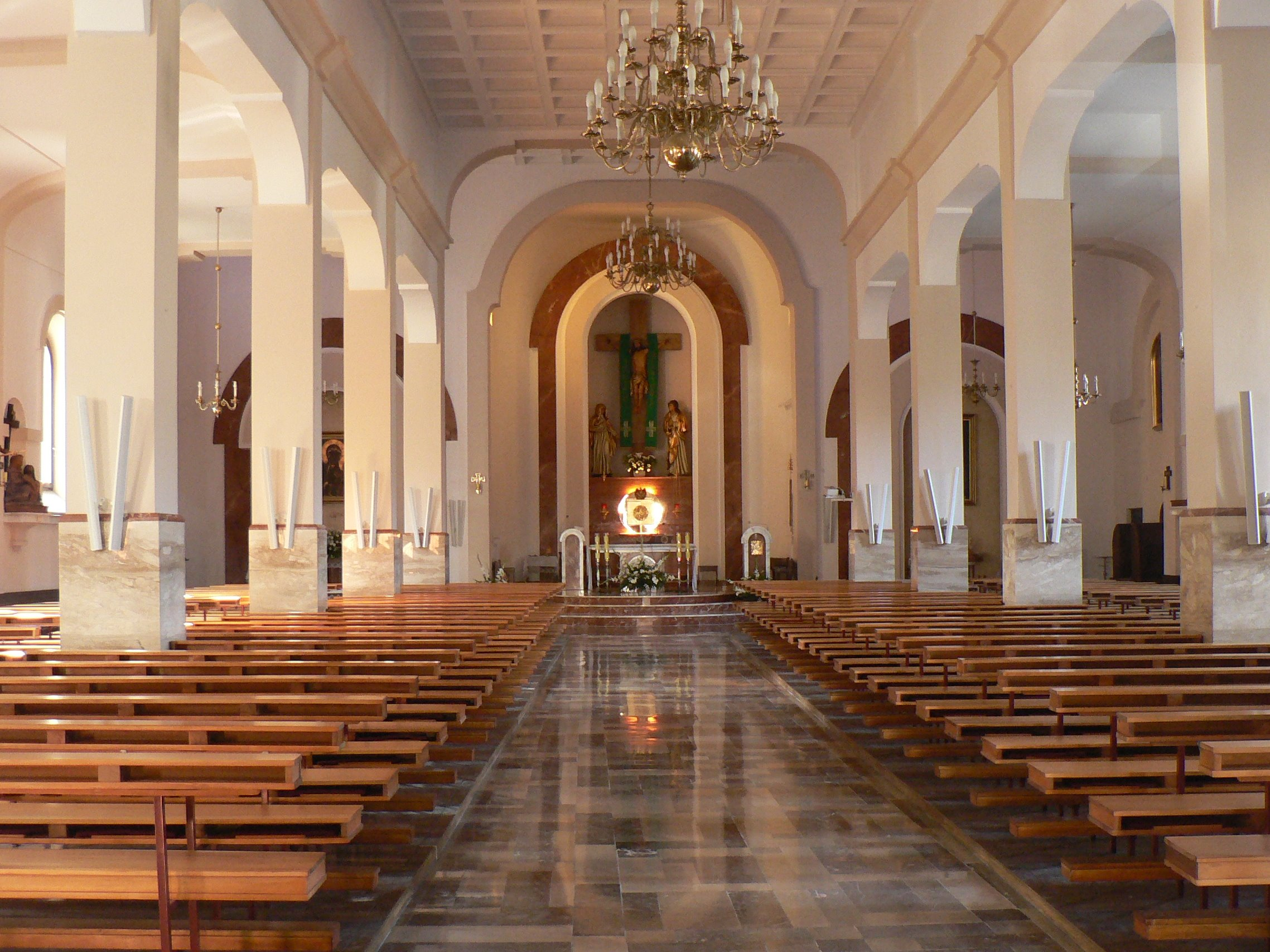 Piastow, kościół pw. Matki Bożej Częstochowskiej